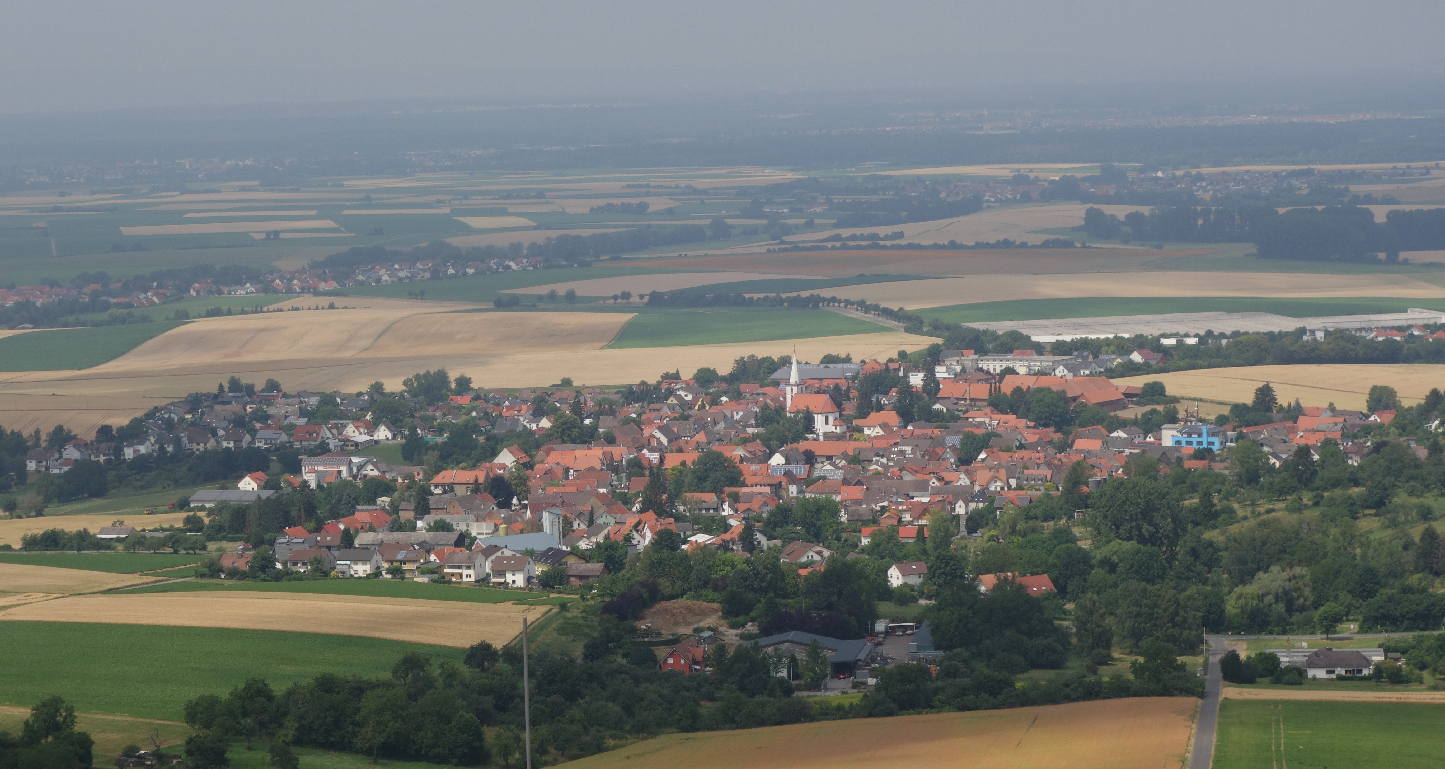 Lengfeld Ortsteil und Gemeindesitz von Otzberg, gesehen von der Veste Otzberg